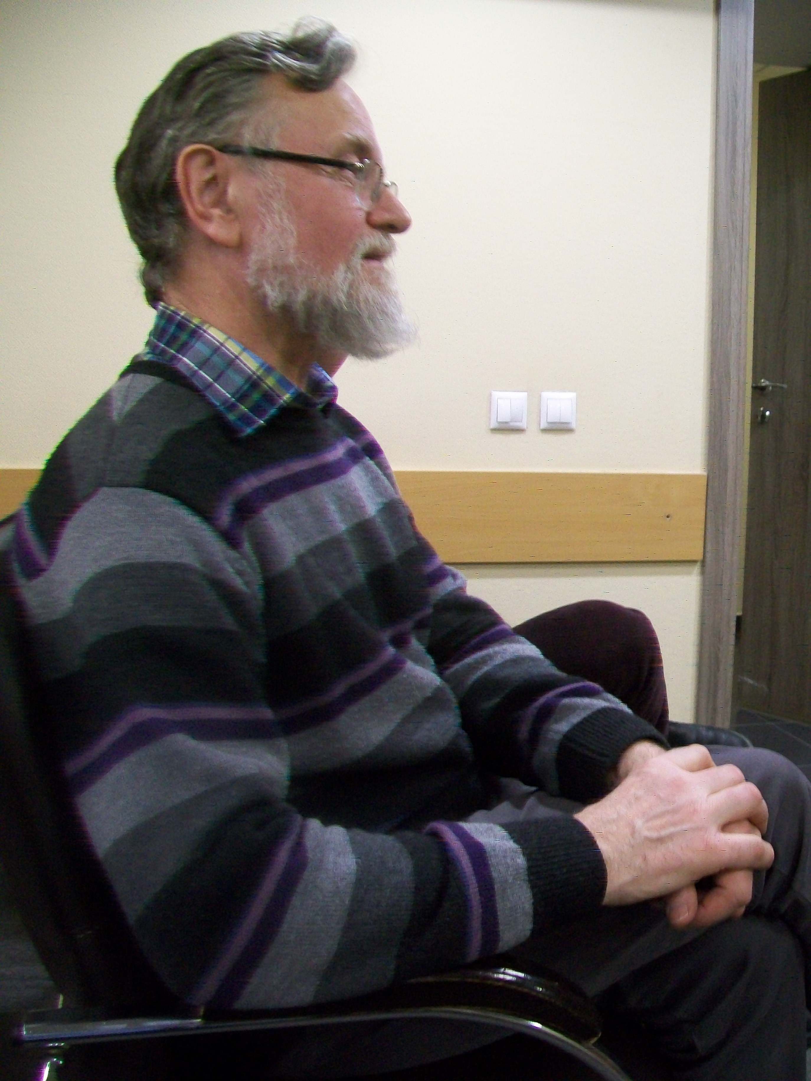 Павел Михайлович Кудюкин на мероприятии "Университетской солидарности" в Екатеринбурге